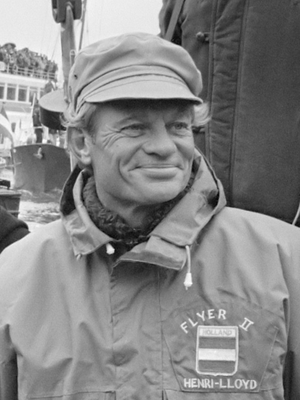 Flyer komt aan in Rotterdam na winnen van Whitbraerd zeilrace. De Flyer komt aan met aan boord onder anderen Conny van Rietschoten en Bernhard 8 april 1982